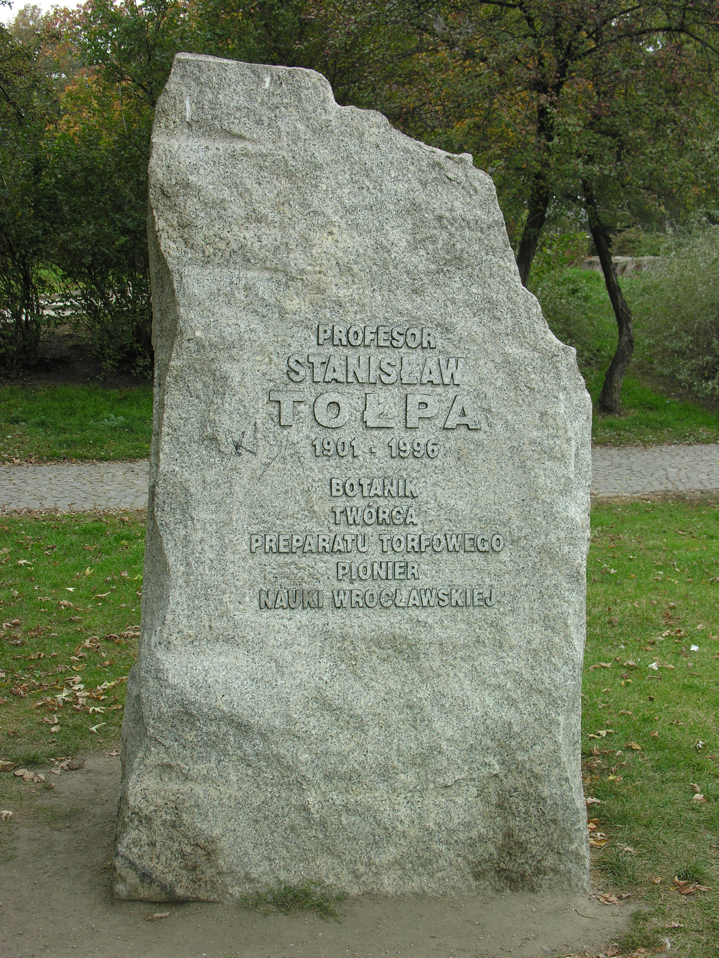 Pomnik Stanisława Tołpy we Wrocławiu, Park przy ul. Nowowiejskiej